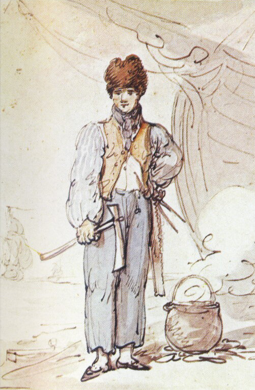 Royal Navy carpenter